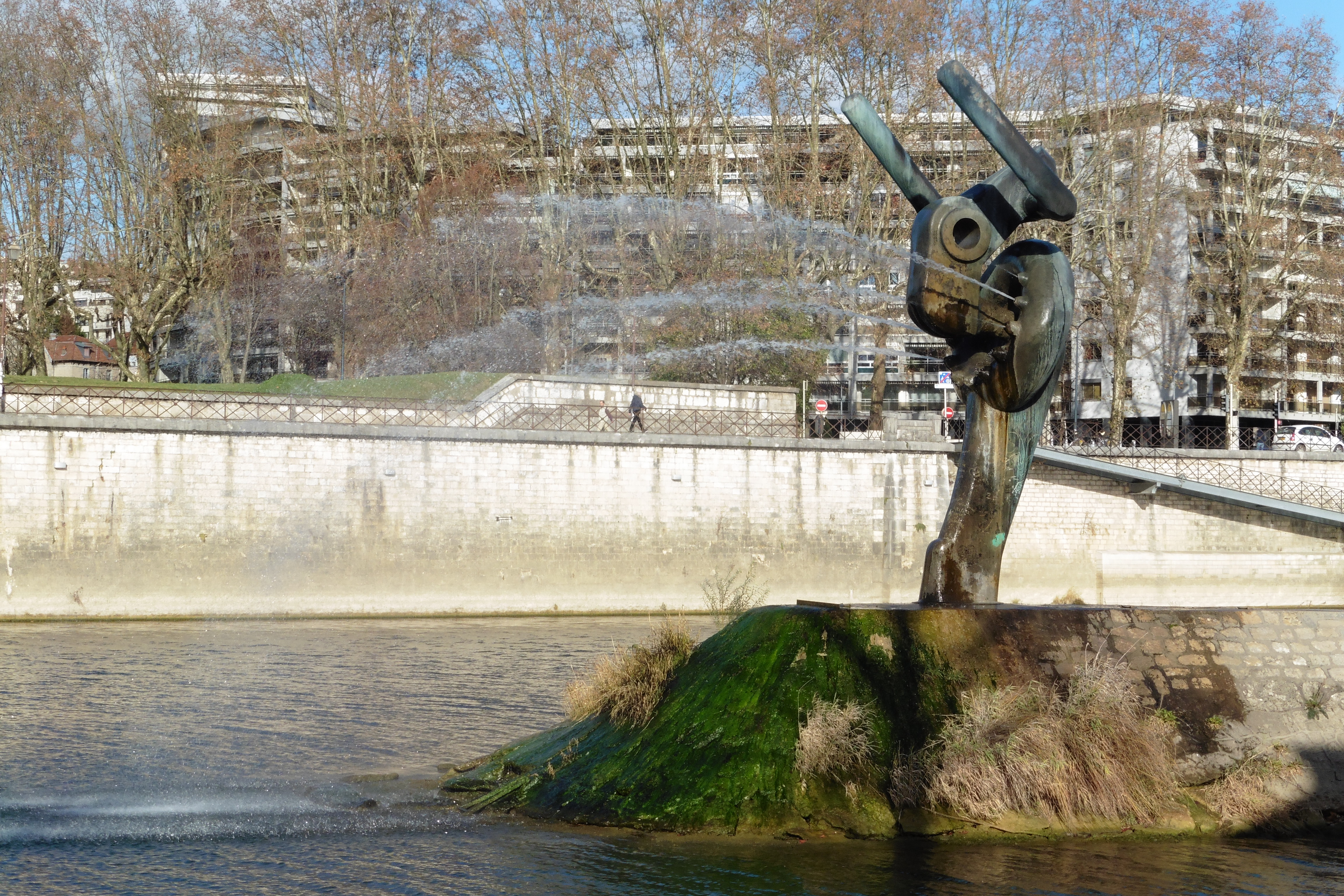 Sculpture